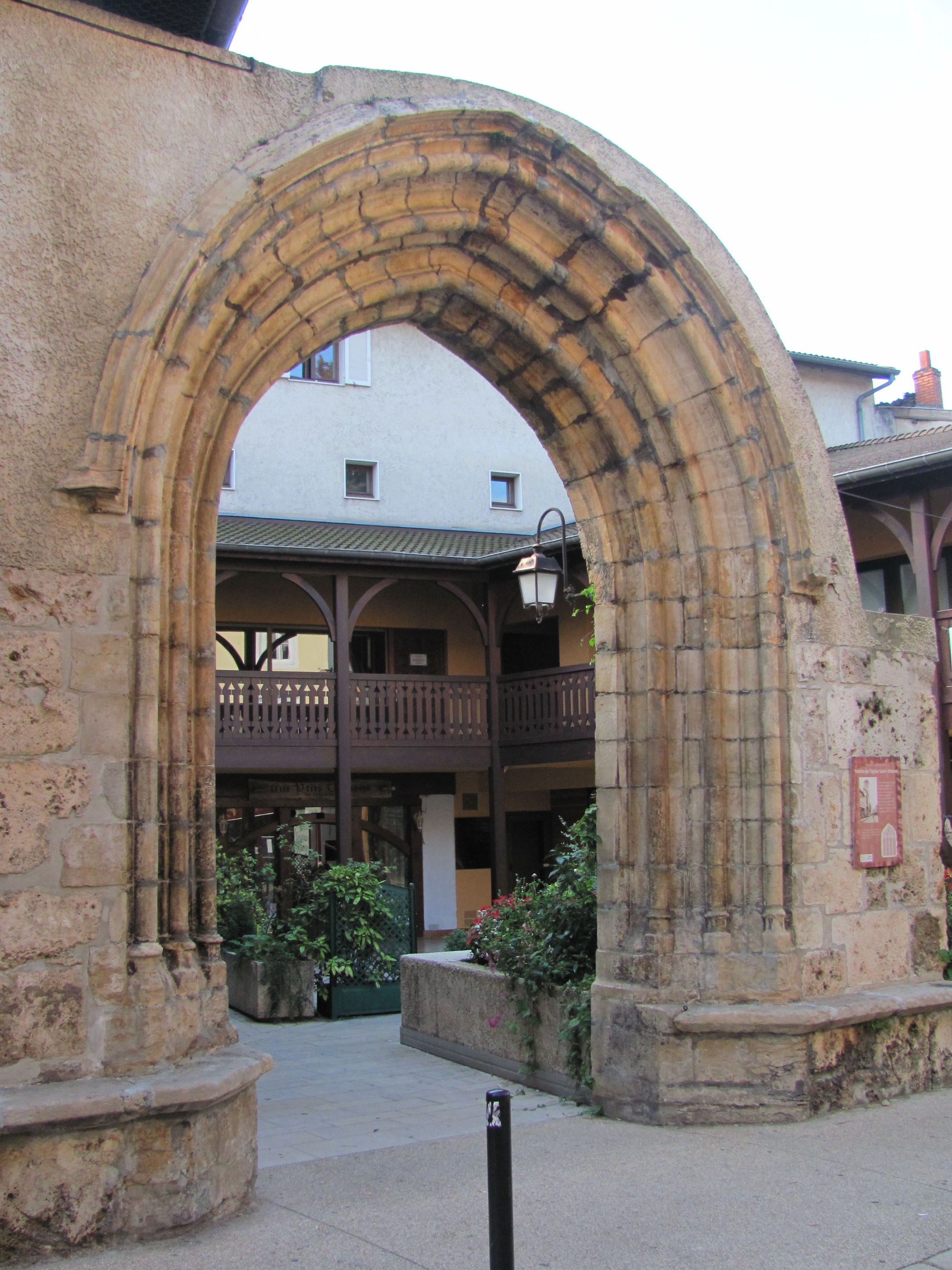 Vestige de l'église Saint-Romain de Montluel.